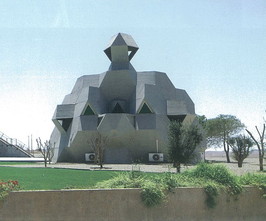 bahad 1 synagogue